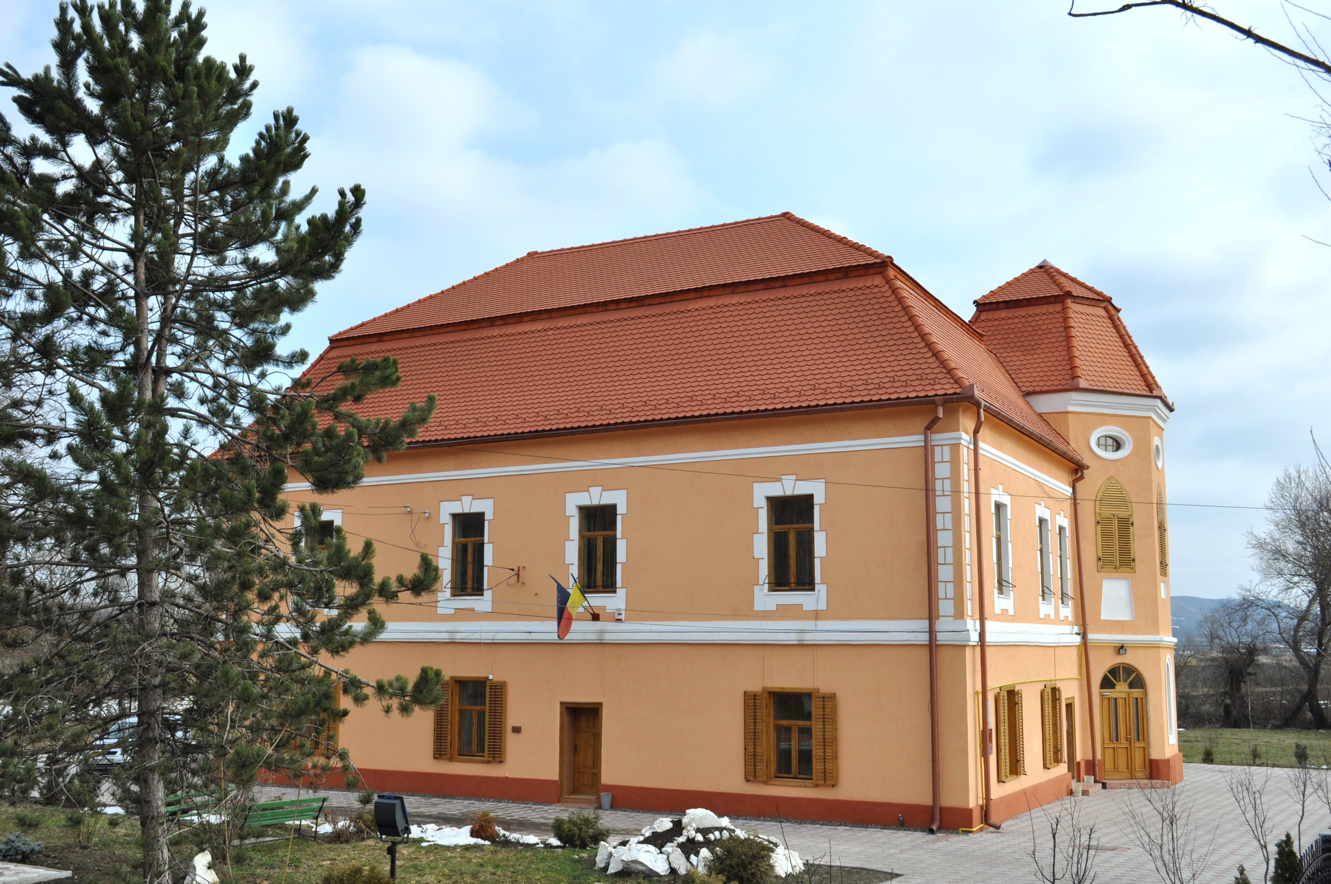 Conacul Keresztes-Eperjesi sat Mica; comuna Mica